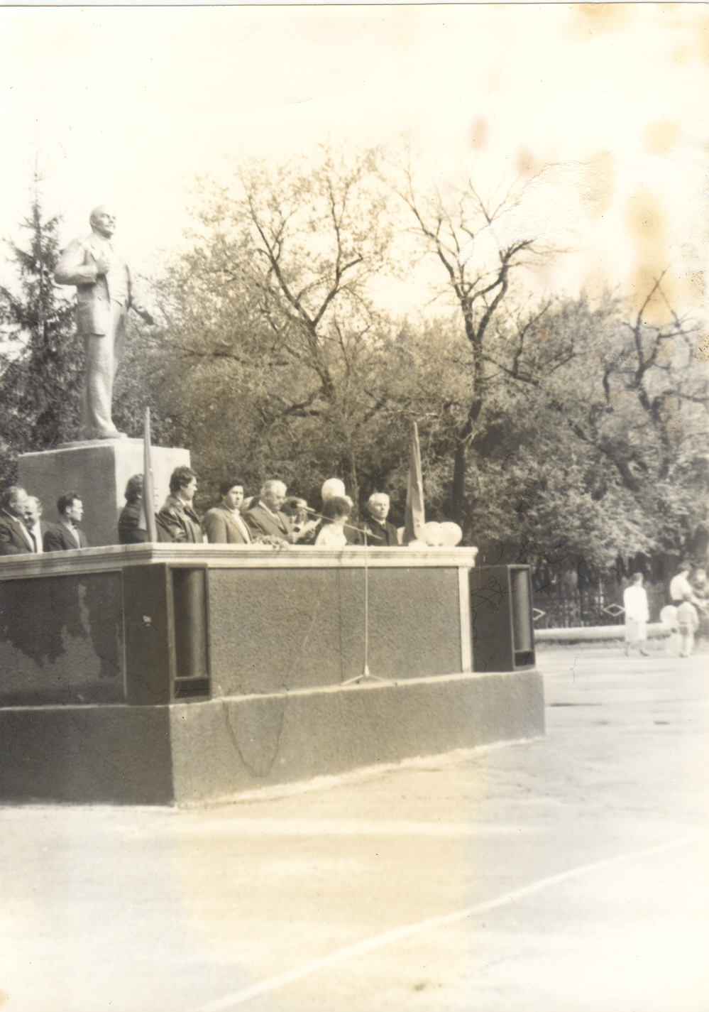 Центральная площадь и памятник Ленину в селе Братушаны в советский период